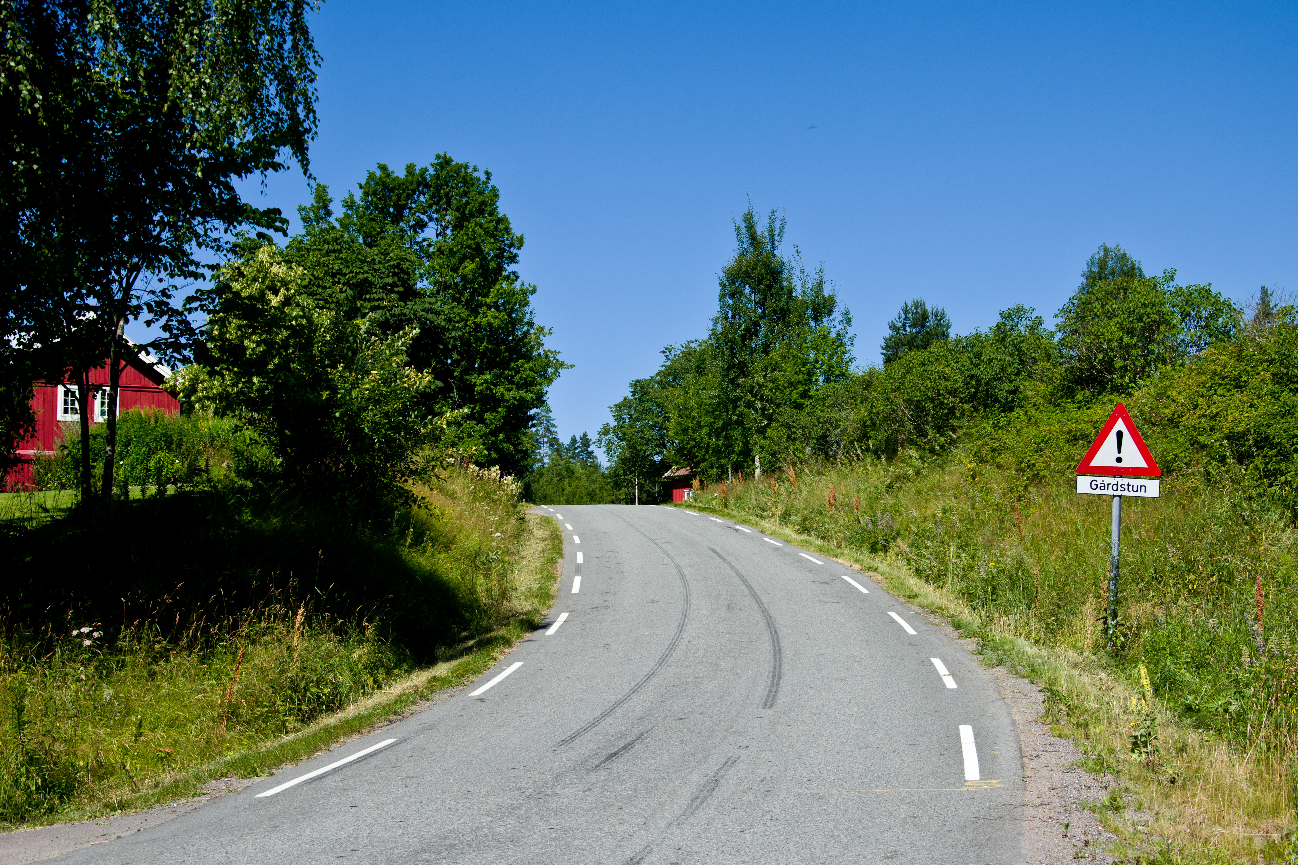 Fylkesvei 765 Bettumveien i Re, Vestfold